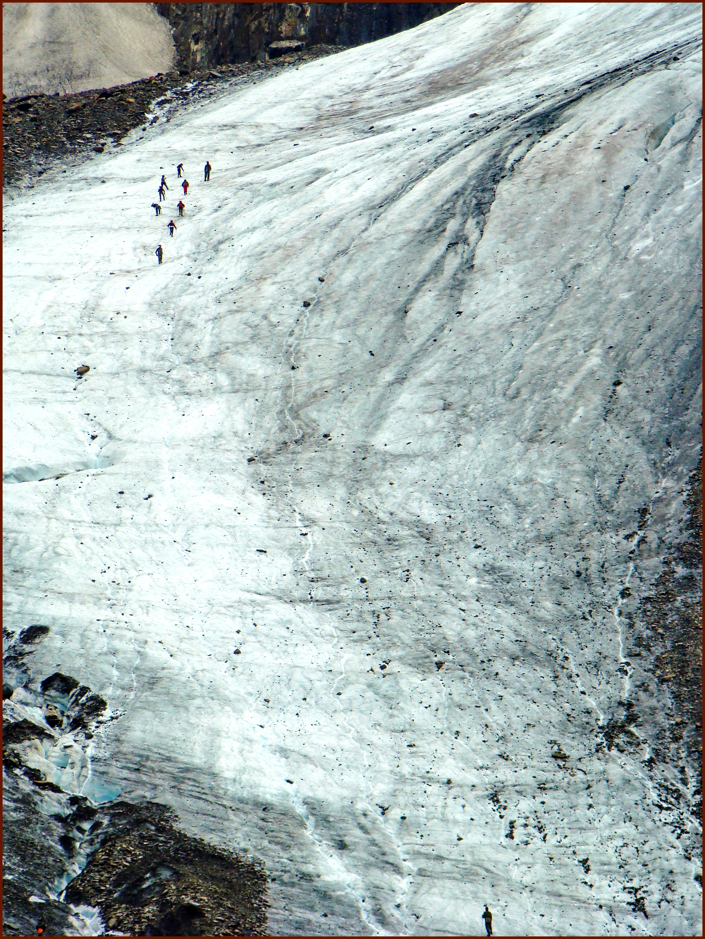 Ледовые занятия на леднике Малый Актру на Алтае